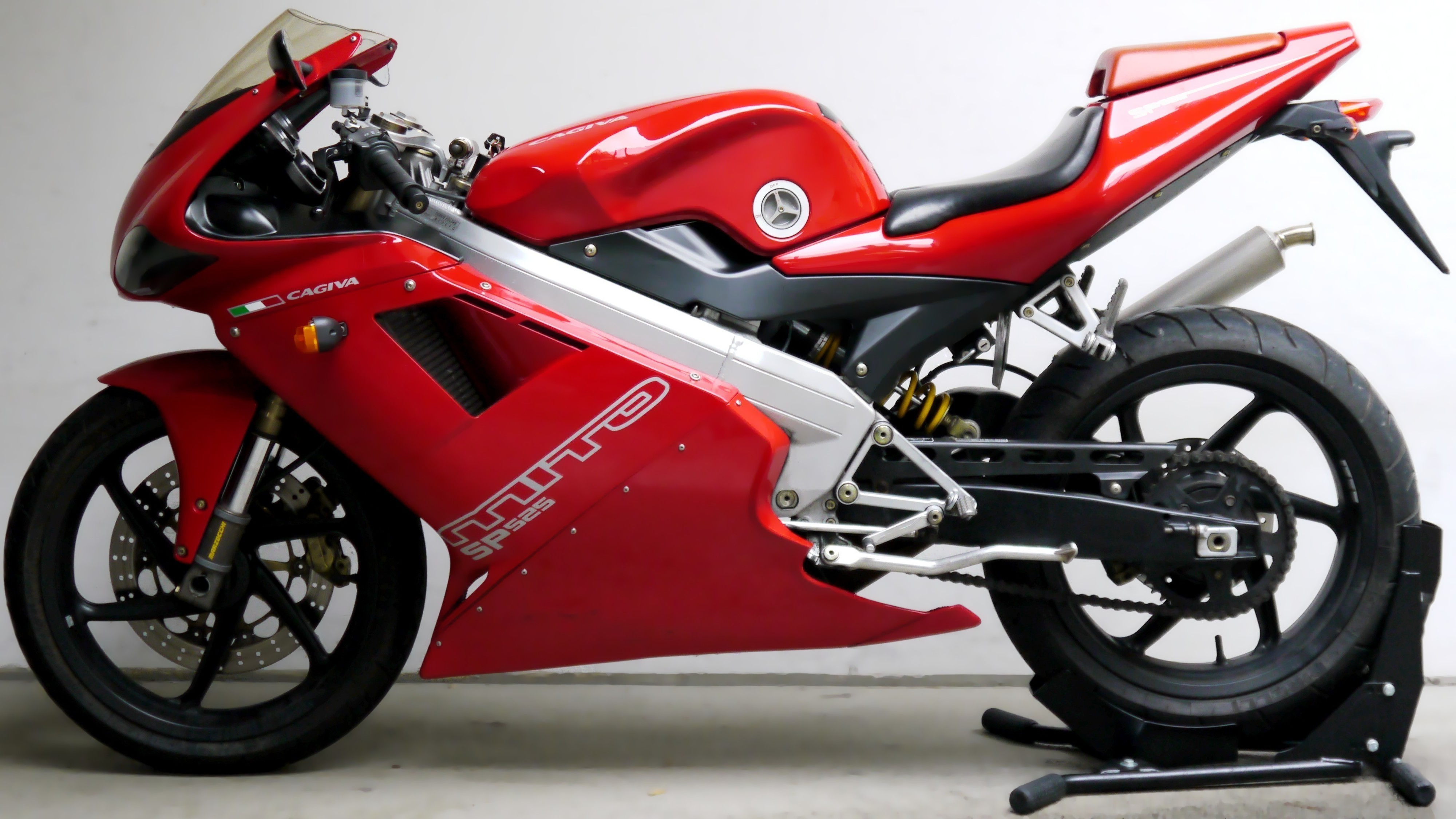 Cagiva Mito SP525 - Zustand Kauf 032